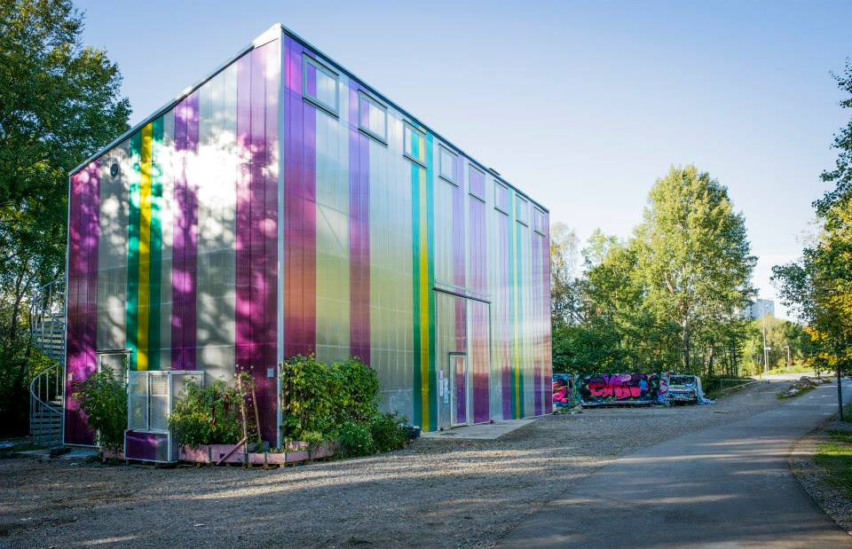 Cyklopen 2 sommaren 2014